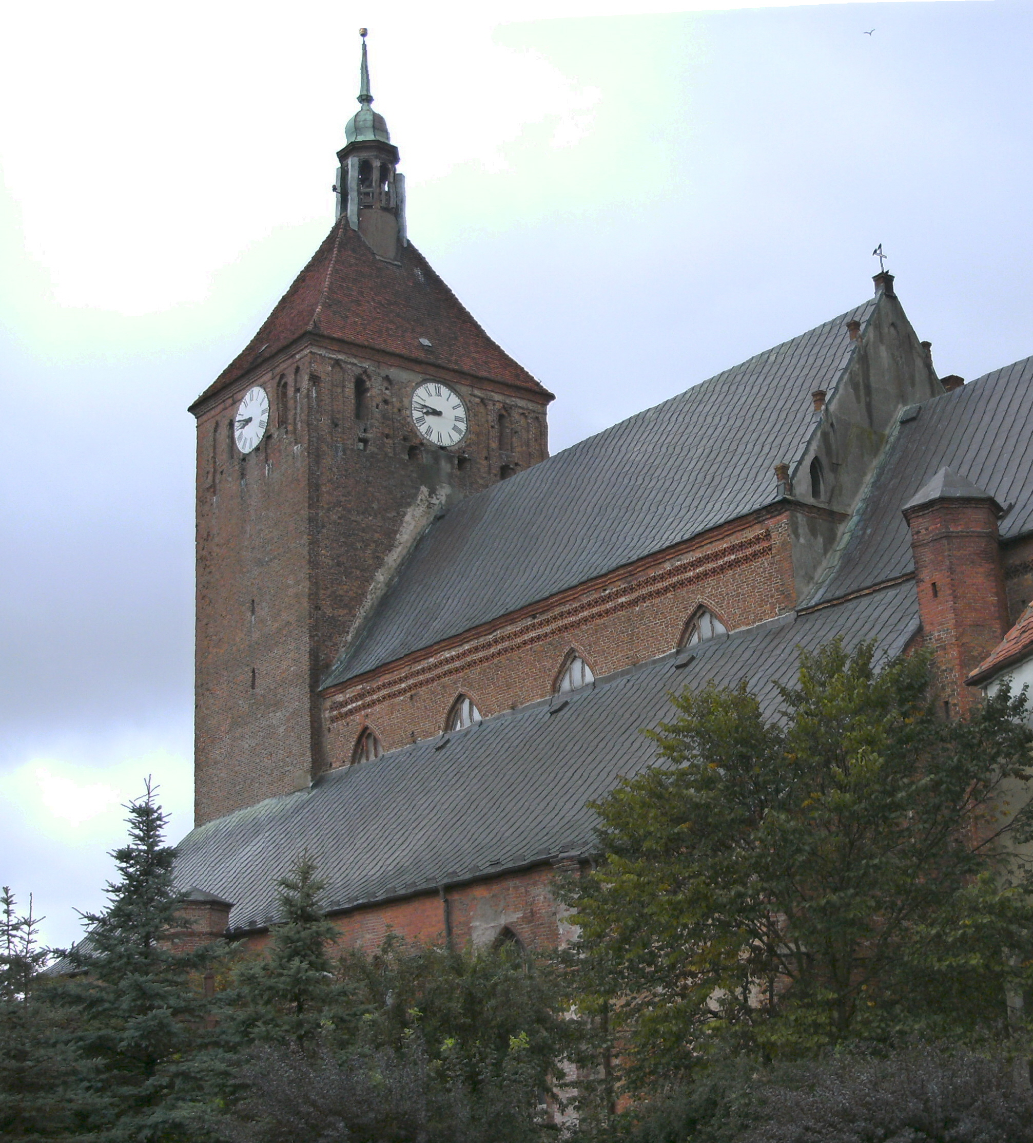 Marienkirch in Rügenwalde